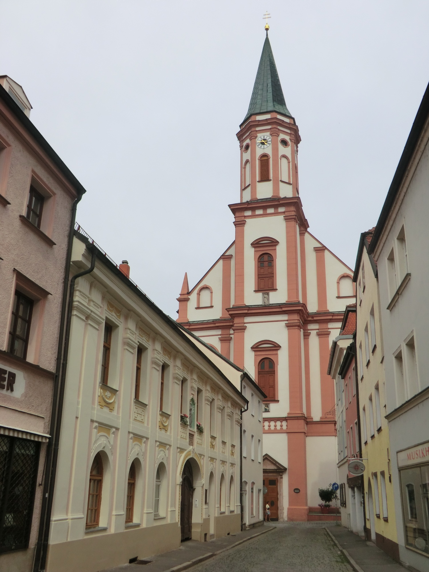 Straubing; Blick in Richtung Osten längs der Zollergasse auf die Carmelite Abbey Native nameKarmelitenklosterLocationStraubing, Lower Bavaria, GermanyCoordinates48° 53′ 01.68″ N, 12° 34′ 21.36″ E Authority control : Q1734056 institution QS:P195,Q1734056